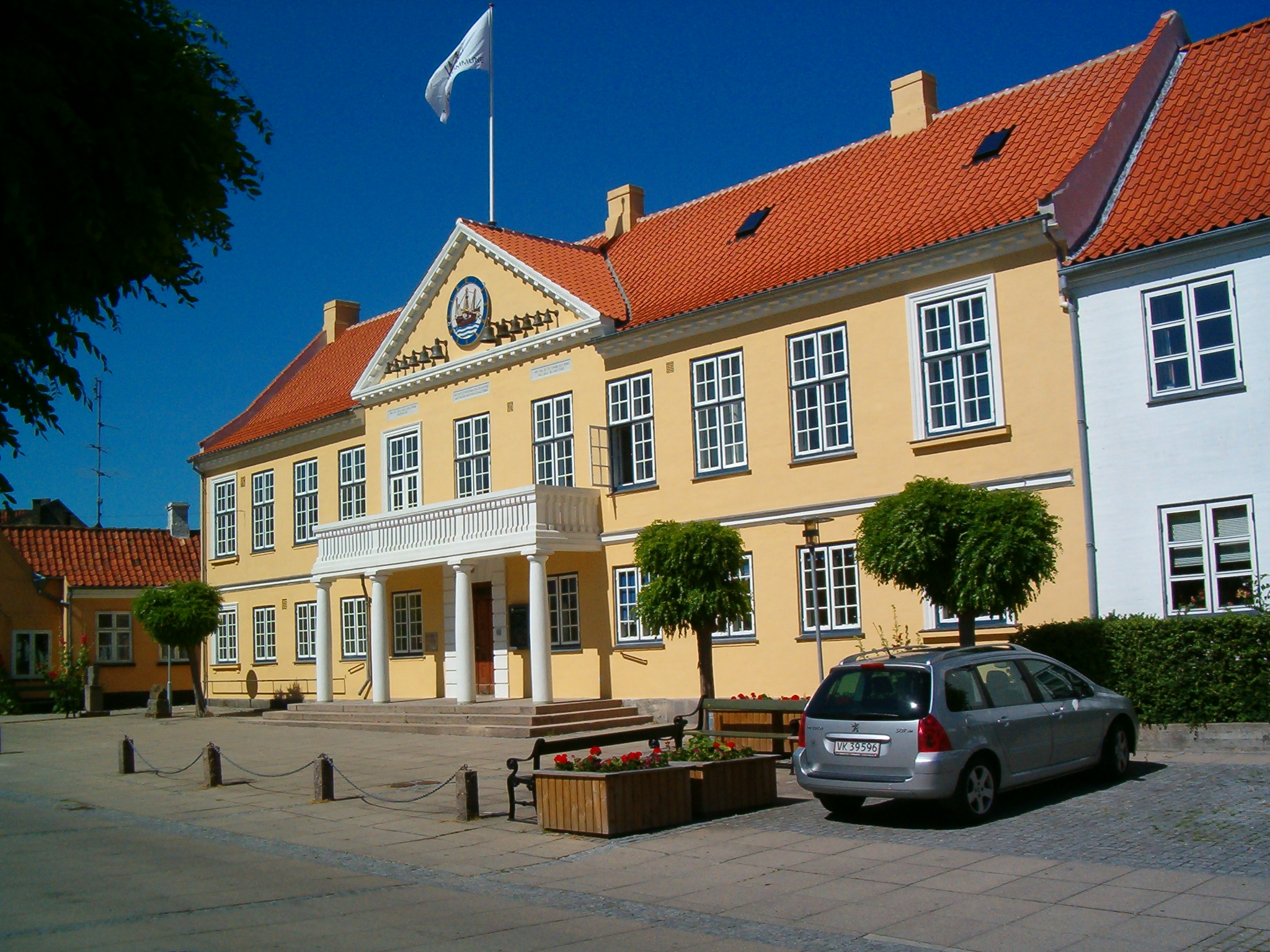 Nysted rådhus fra 1852 på Adelgade 61 Town Hall --Erik Damskier 19:42, 7 July 2006 (UTC)